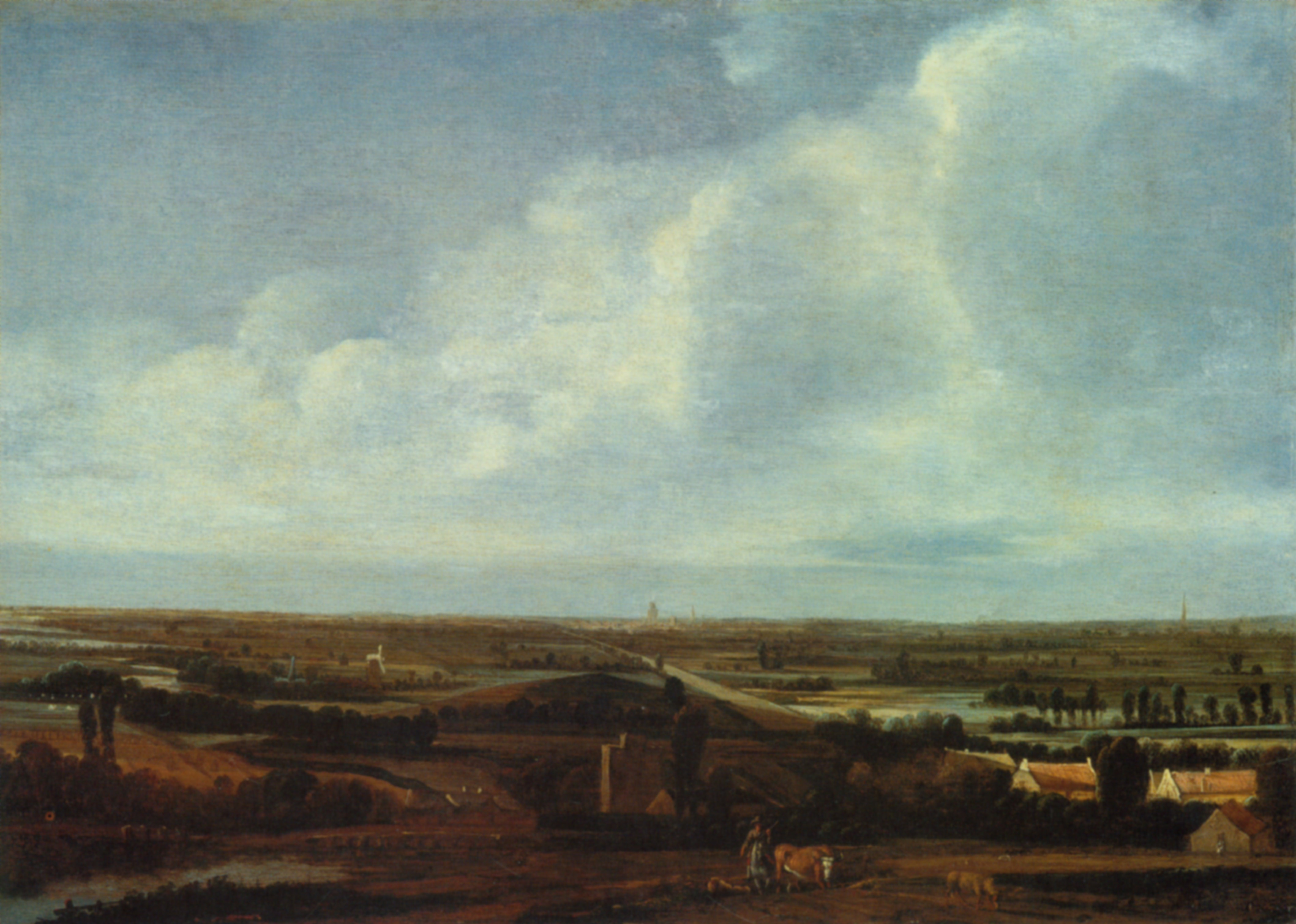 Flachlandschaft mit Stadt in der Ferne